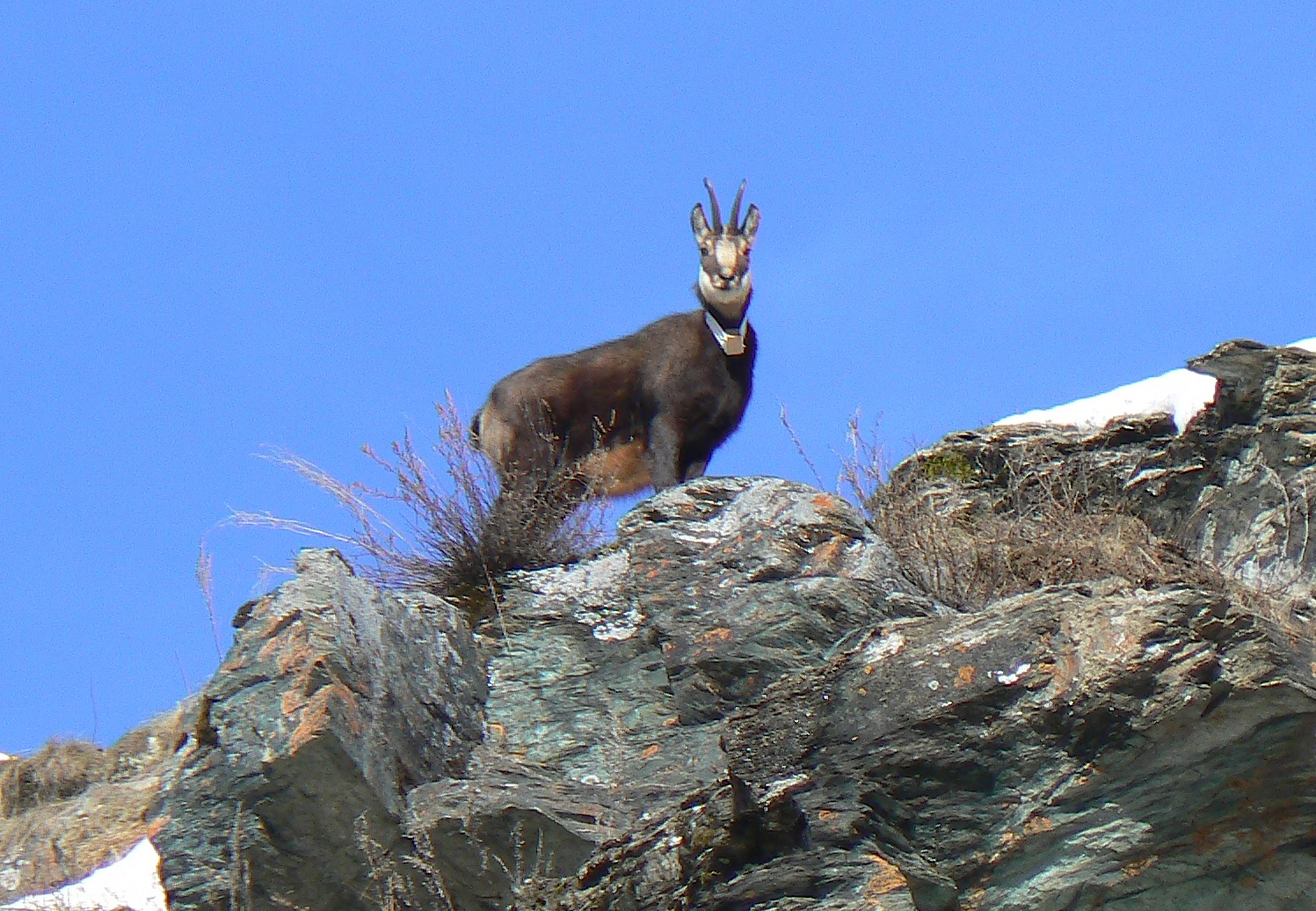 Camoscio con radiocollare a pochi passi dal Villaggio di Tignet, nel Parco Nazionale del Gran Paradiso, in Valsavarenche. Come il vicinissimo villaggio di Nex è uno dei pochi vllaggi conservatisi integri dal basso medioevo, tra i maggiori esempi valdostani di architettura alpina tradizionale. Comune di Valsavarenche, Valle d'Aosta, Italia.